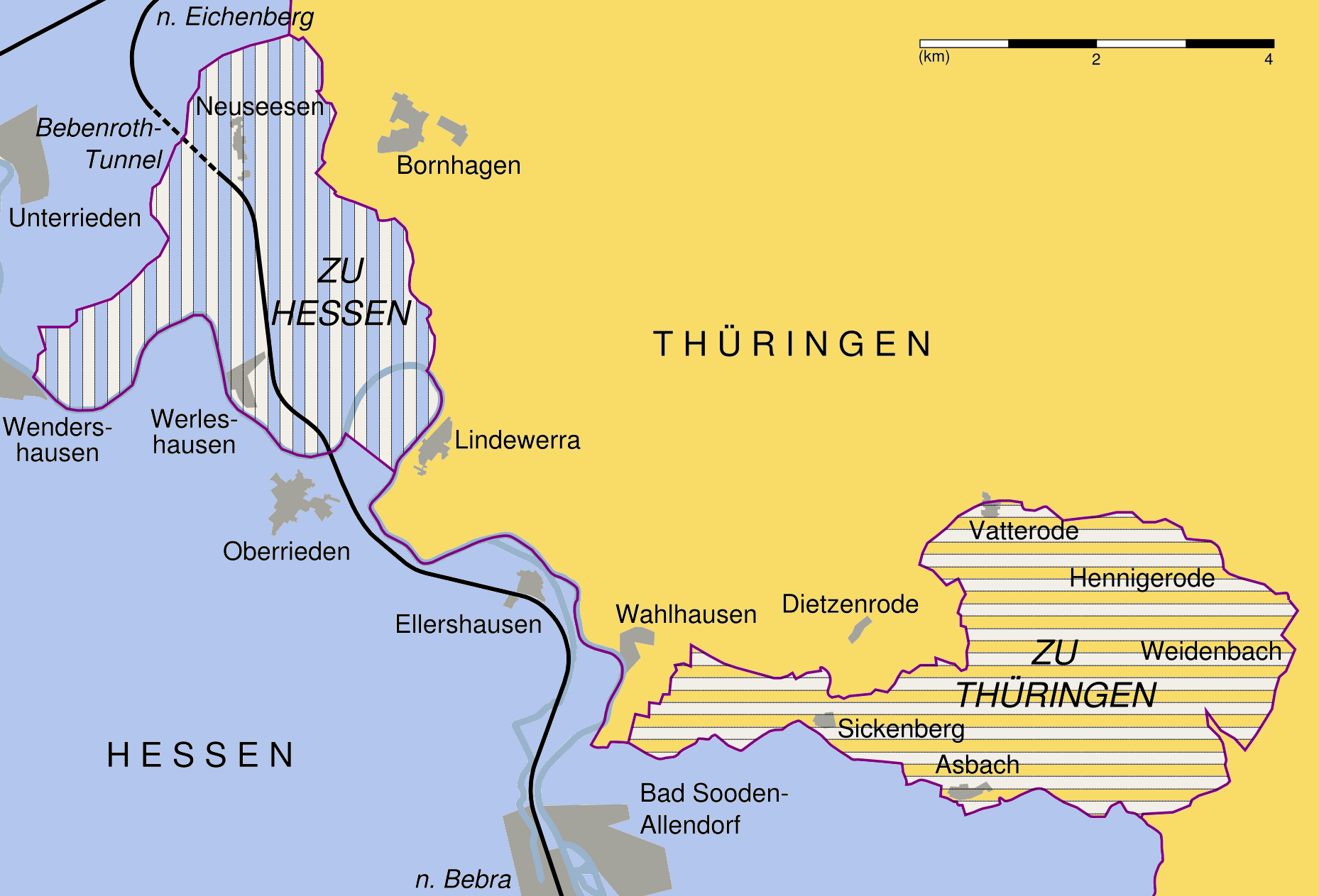 Gebietstausch durch das Wanfrieder Abkommen am 17. September 1945.